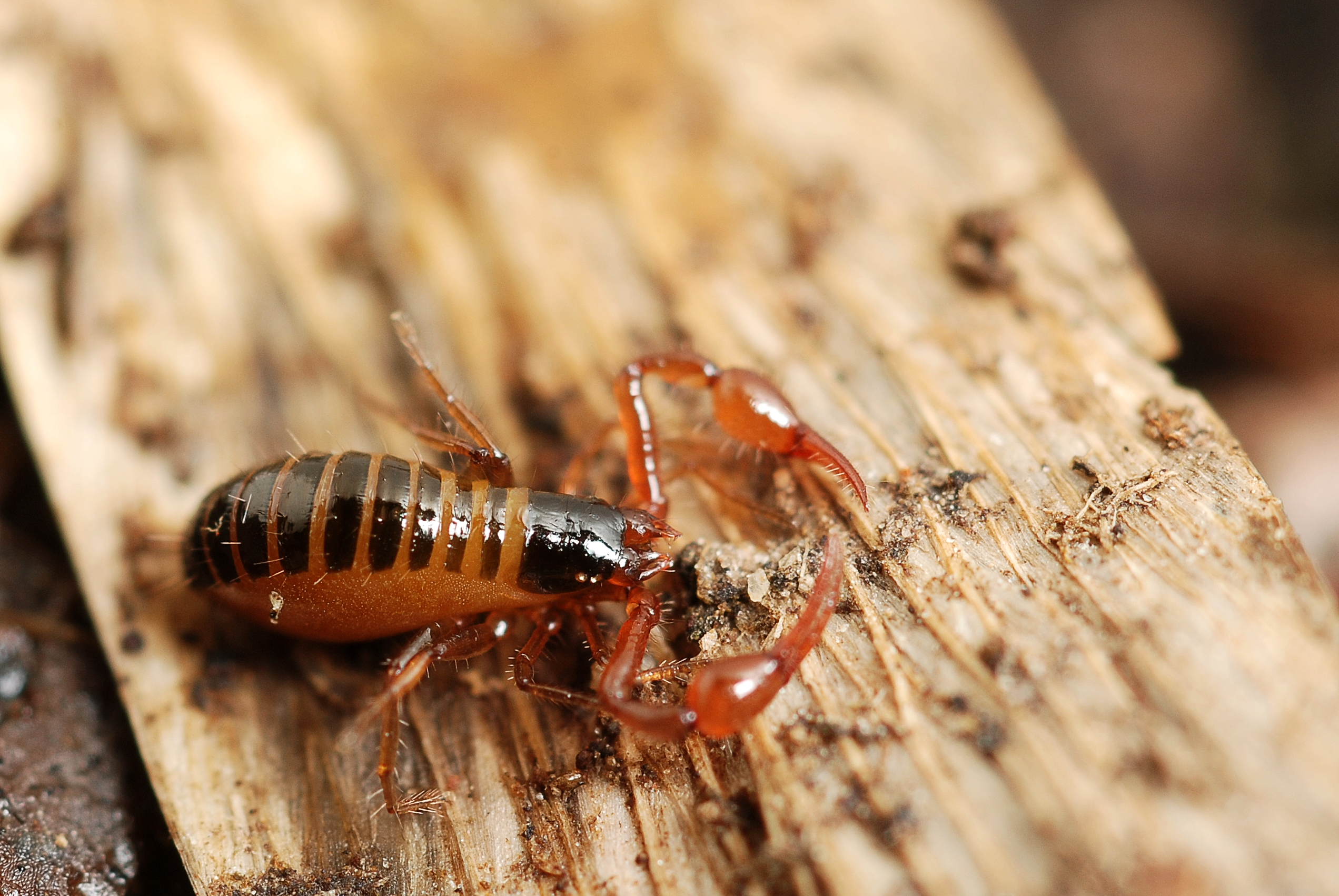 Neobisium sp.